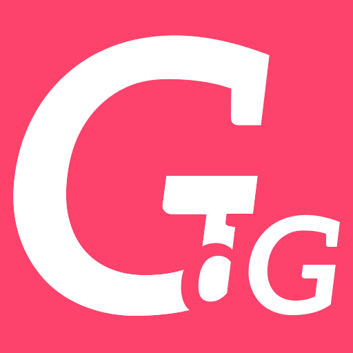 Das Icon der Web-Plattform Geschichte der Gegenwart